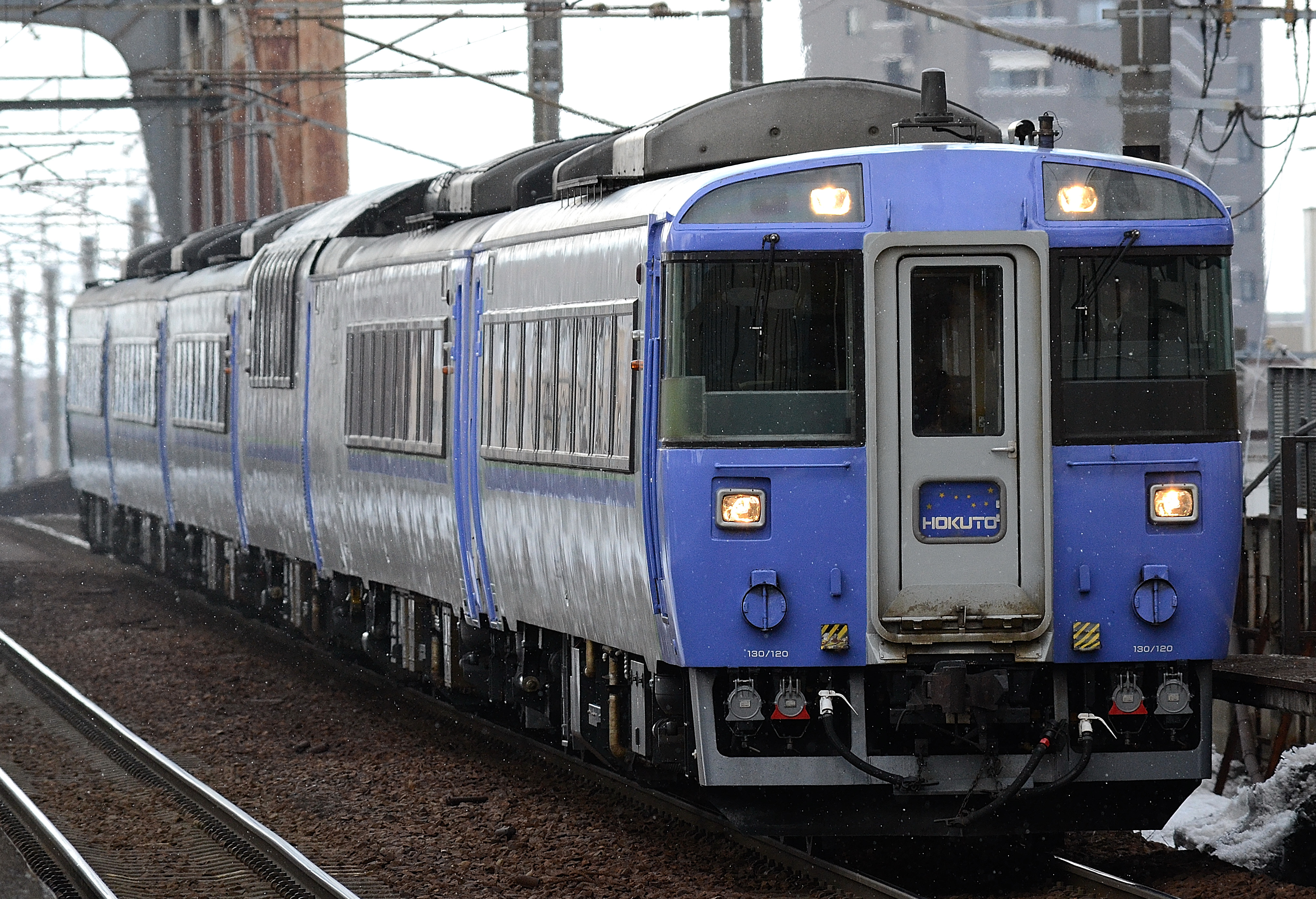 新札幌駅に到着する183系気動車の特急「北斗｣12号